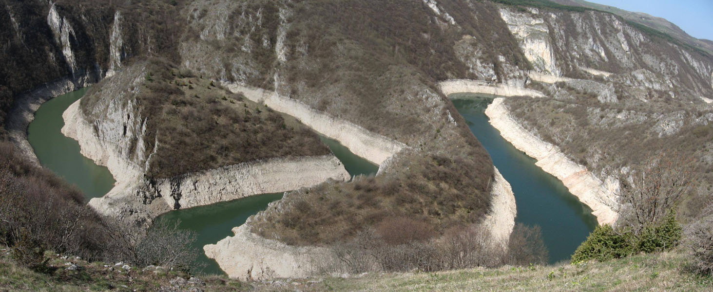 Uvac